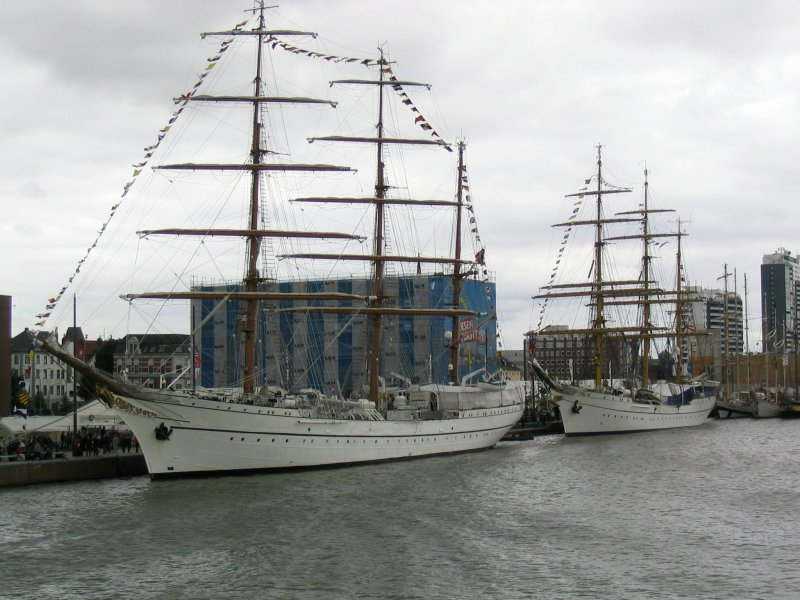 Segelschiff Sagres II auf der Sail 2005 in Bremerhaven. Im Hintergrund liegt die Gorch Fock